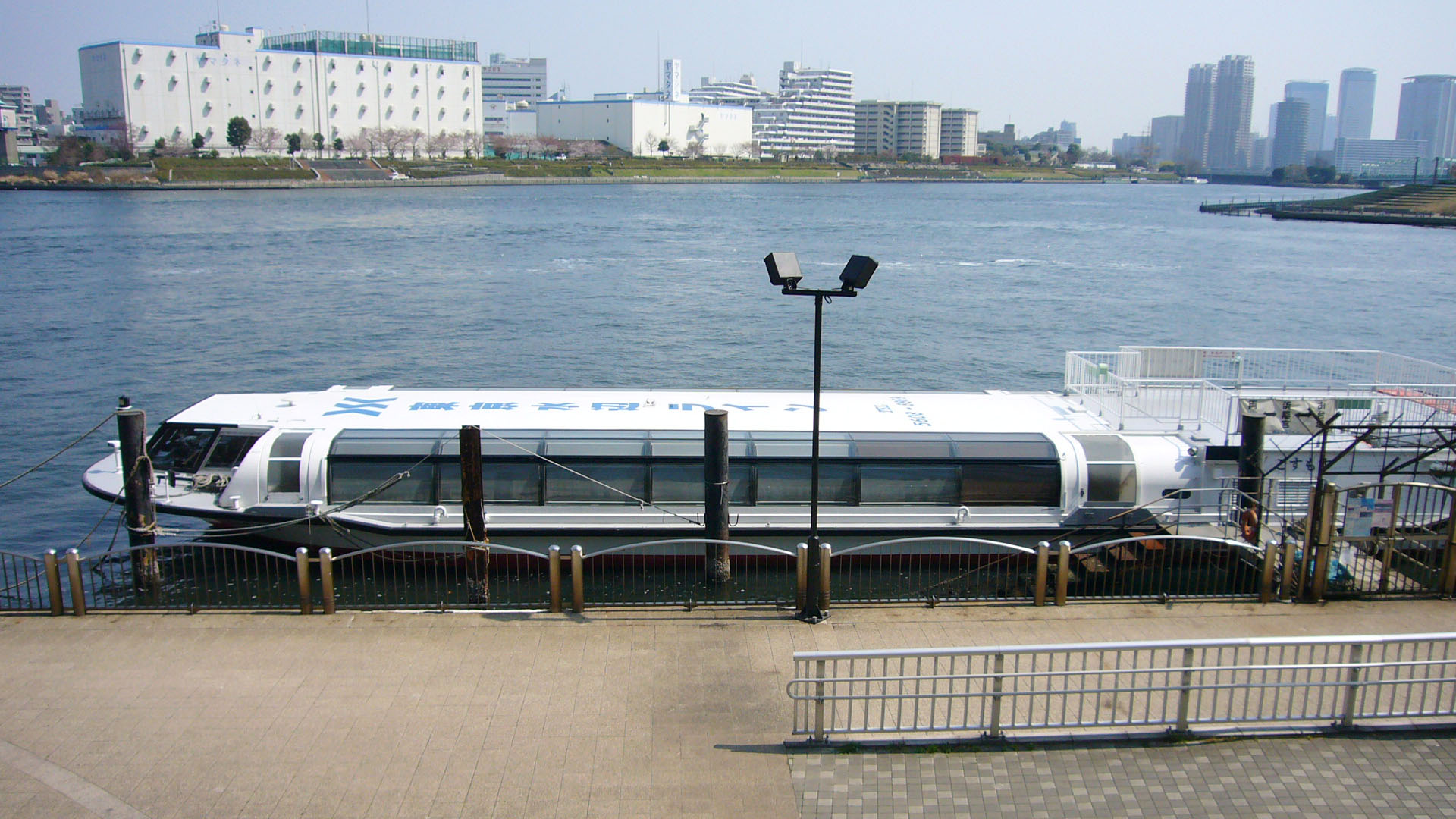 Tokyo Mizube Cruising Line at Chuo-ku, Tokyo, Japan